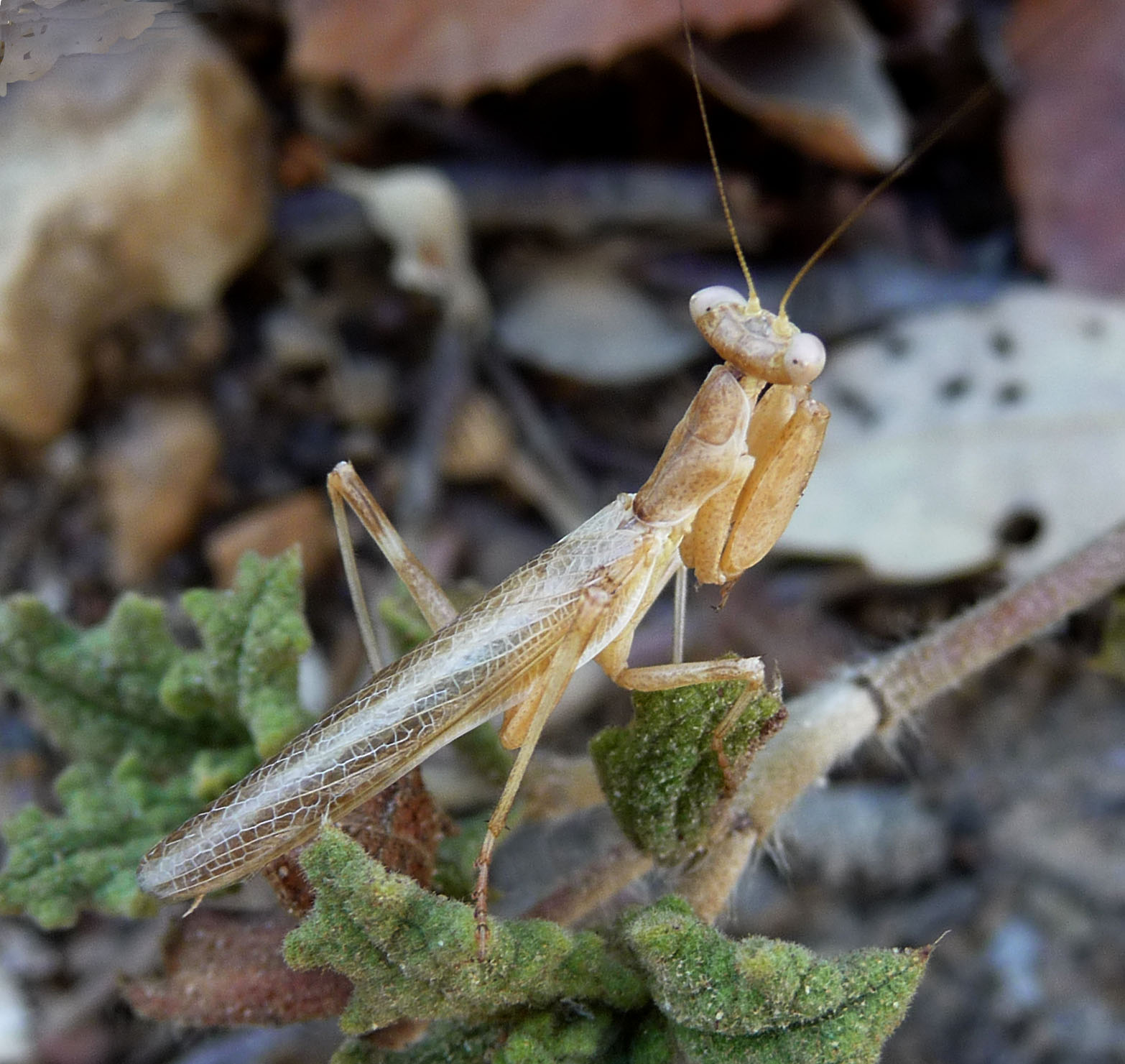 Ameles sp. ( spallanzania? )Mantidae